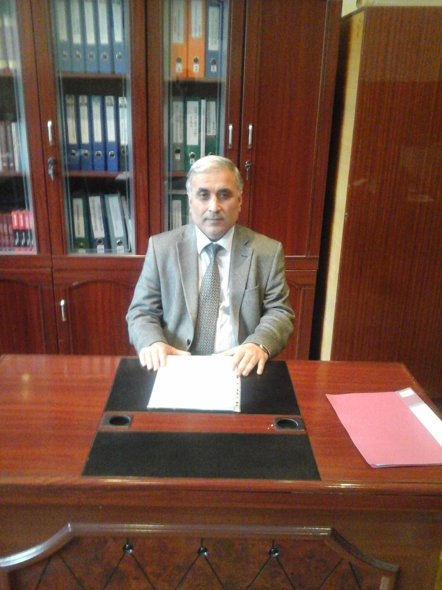 Məhərrəm Məmmədov BDU-da